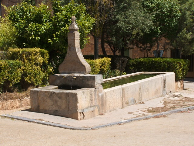 Fuente Caltojar